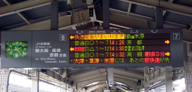 大阪駅ホームに設置されているLED